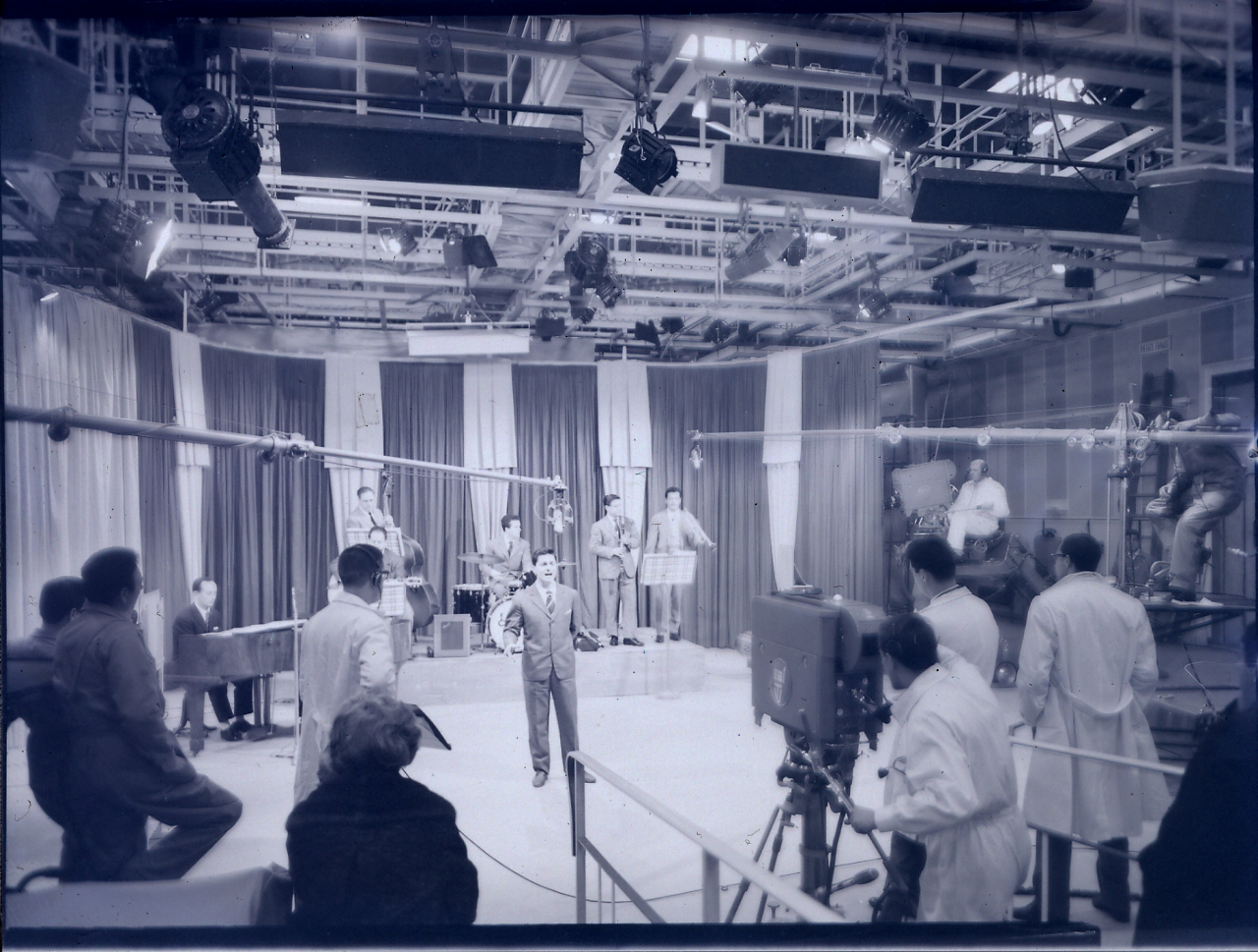 Servizio fotografico : Roma, 1958 / Paolo Monti. - Buste: 25, Fototipi: 26 : Negativo b/n, gelatina bromuro d'argento/ pellicola ; 10x12. - ((Serie costituita da 25 buste di negativi identificati con una doppia numerazione: 18048 (76), 18049 (77), 18050/18051 (78), 18052 (79), 18053 (80), 18054 (81), 18055 (82), 18056 (83), 18057 (84), 18058 (85), 18059 (86), 18060 (87), 18061 (88), 18062 (89), 18063 (90), 18064 (91), 18065 (92), 18066 (93), 18067 (94), 18068 (95), 18069 (96), 18070 (97), 18071 (98), 18072 (99), 18073 (100), e tenute insieme da una graffetta. - La doppia numerazione, presumibilmente è una numerazione interna alla serie di negativi "Rai-Tv Roma 1".La busta identificata con la numerazione 18050/51 contiene 2 negativi, che non è però possibile identificare singolarmente. Molti fototipi presentano segni di degrado: alterazioni tonali, bolle e gelatina raggrinzita. - Occasione: Documentazione per la pubblicazione: Sinisgalli Leonardo (a cura di), "Il centro televisivo di Roma", Torino, ERI, 1958. - : Il centro televisivo di Roma, Torino, ERI (1958). - Fonte: Monografia di Sinisgalli Leonardo (a cura di)